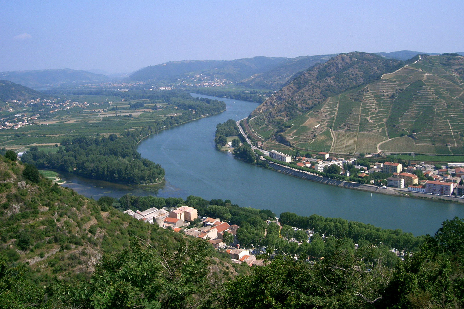 Tournon, confluent du Doux (à gauche) avec le Rhône - Ardèche self made PRA